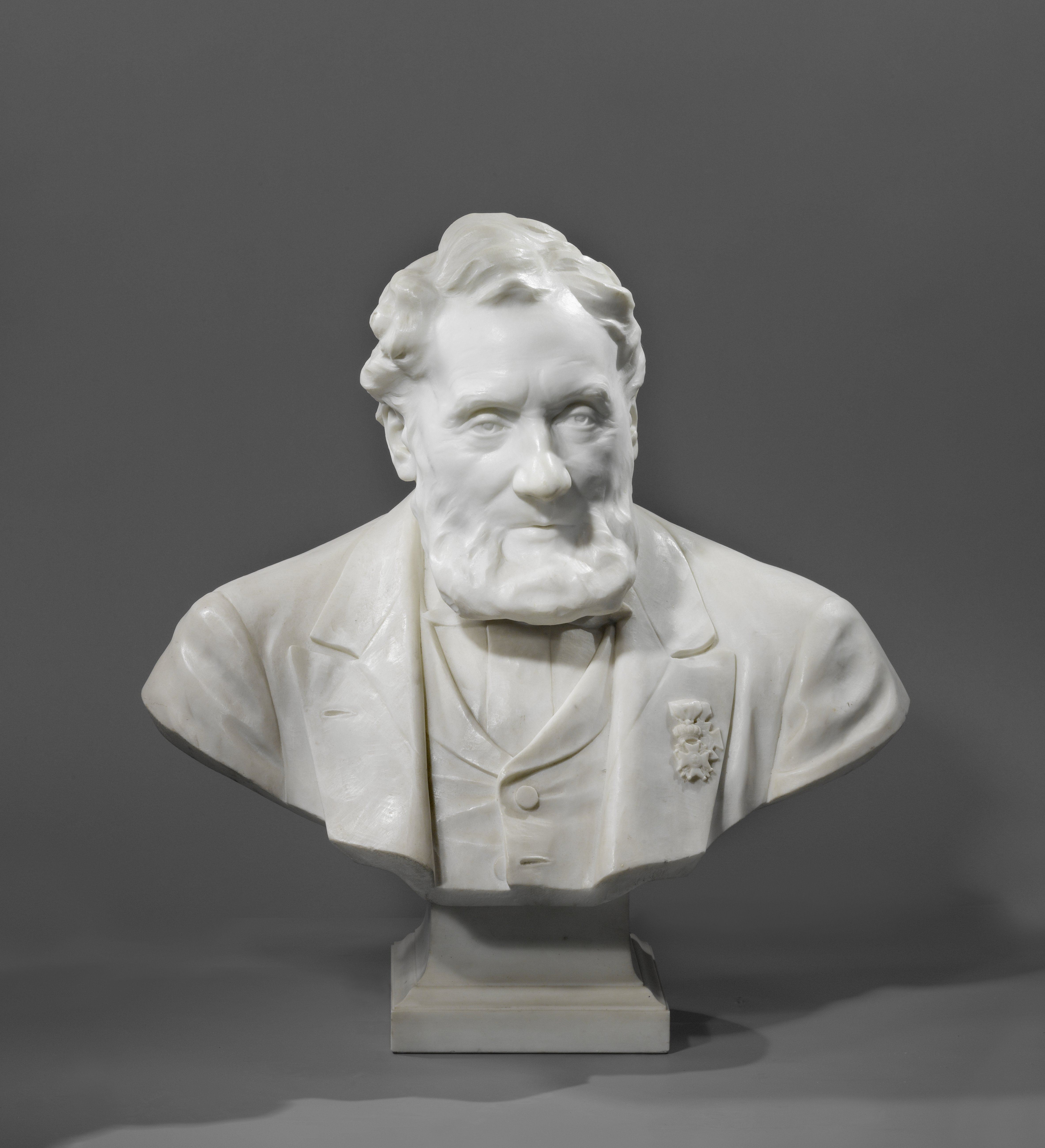 IdentificatieTitel(s): Buste van Johannes Petrus Hazebroek (1812-1896), letterkundigeObjecttype: buste Objectnummer: BK-B-70Opschriften / Merken: signatuur: ‘Keller’Omschrijving: Buste van van Johannes Petrus Hazebroek (1812-1896), letterkundige. Marmer. De sokkel van grijs graniet.VervaardigingVervaardiger: beeldhouwer: Johan KellerPlaats vervaardiging: Den HaagDatering: 1893Fysieke kenmerken: marmer, het voetstuk van granietMateriaal: marmer graniet Afmetingen: h 79,5 cm. × b 71,5 cm. × d 40 cm. × g 144 kgOnderwerpWat: historical persons (+ (full) bust portrait)portrait of a writerWanneer: 1812 - 1896Wie: Johannes Petrus HazebroekVerwerving en rechtenCredit line: Schenking van de Hollandsche Maatschappij van Fraaije Kunsten en WetenschappenVerwerving: schenking sep-1893Copyright: Publiek domein